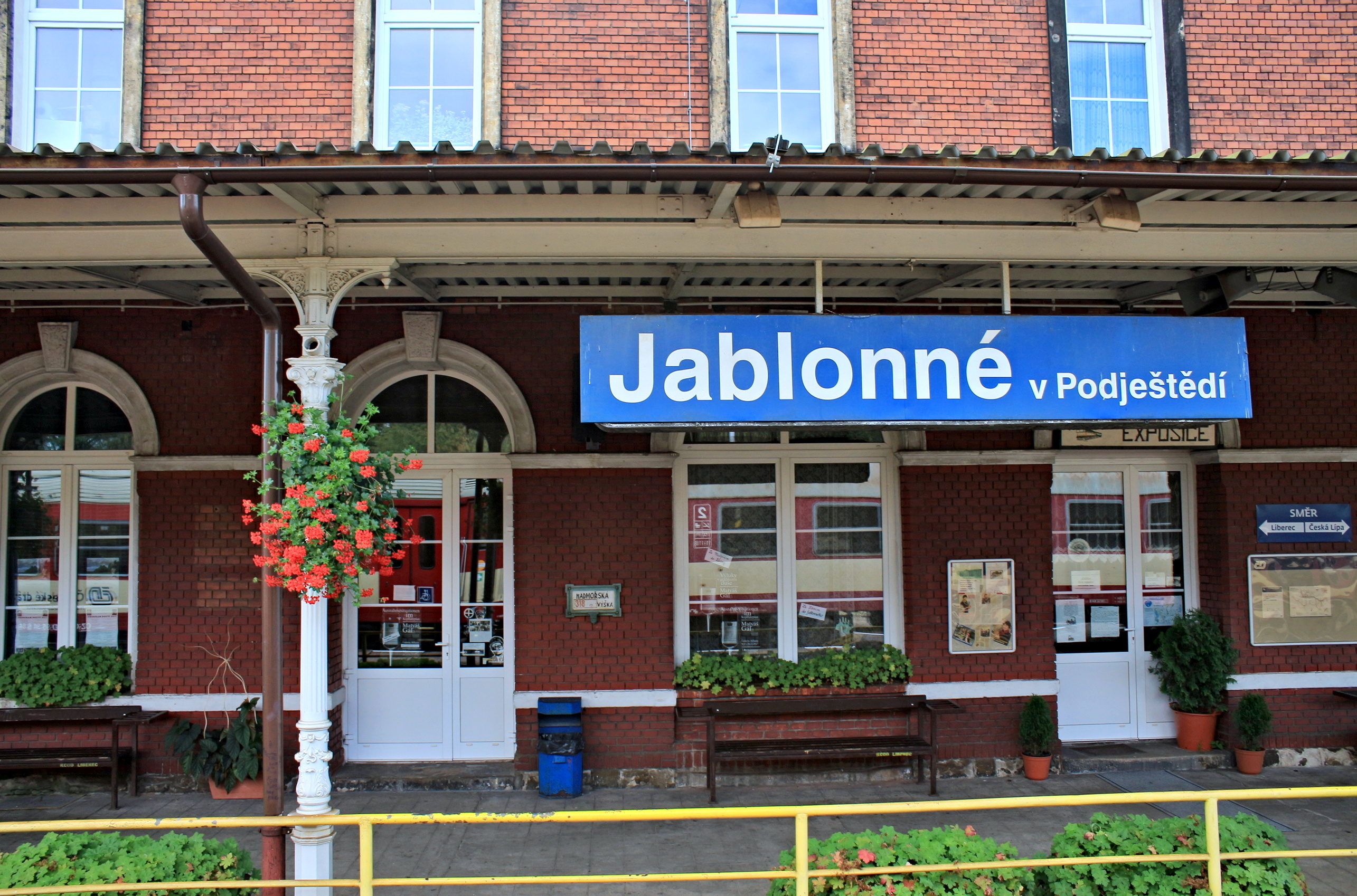 Železniční stanice Jablonné v Podještědí